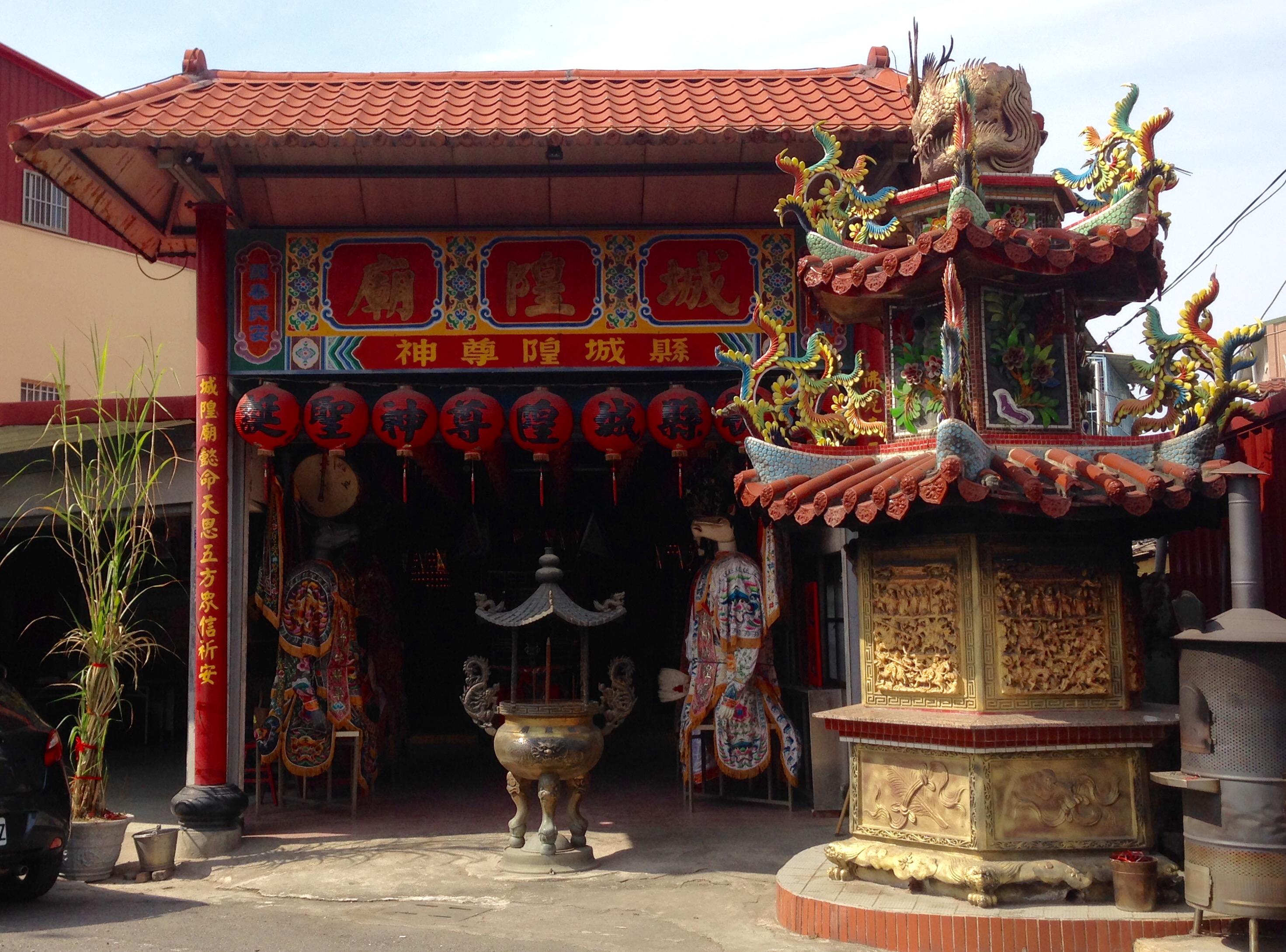 中文（台灣）: 潮州城隍廟